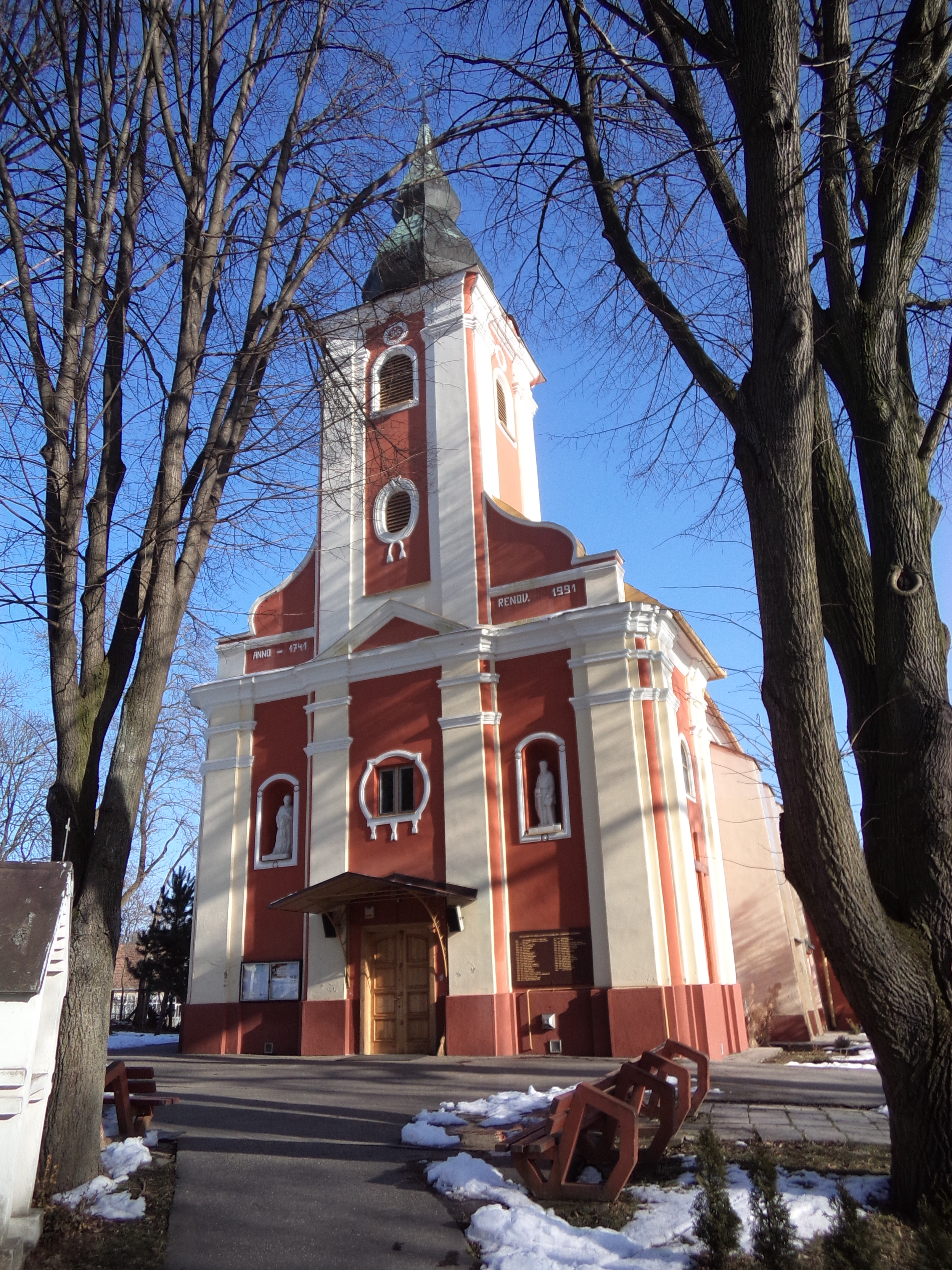 Barsfüss